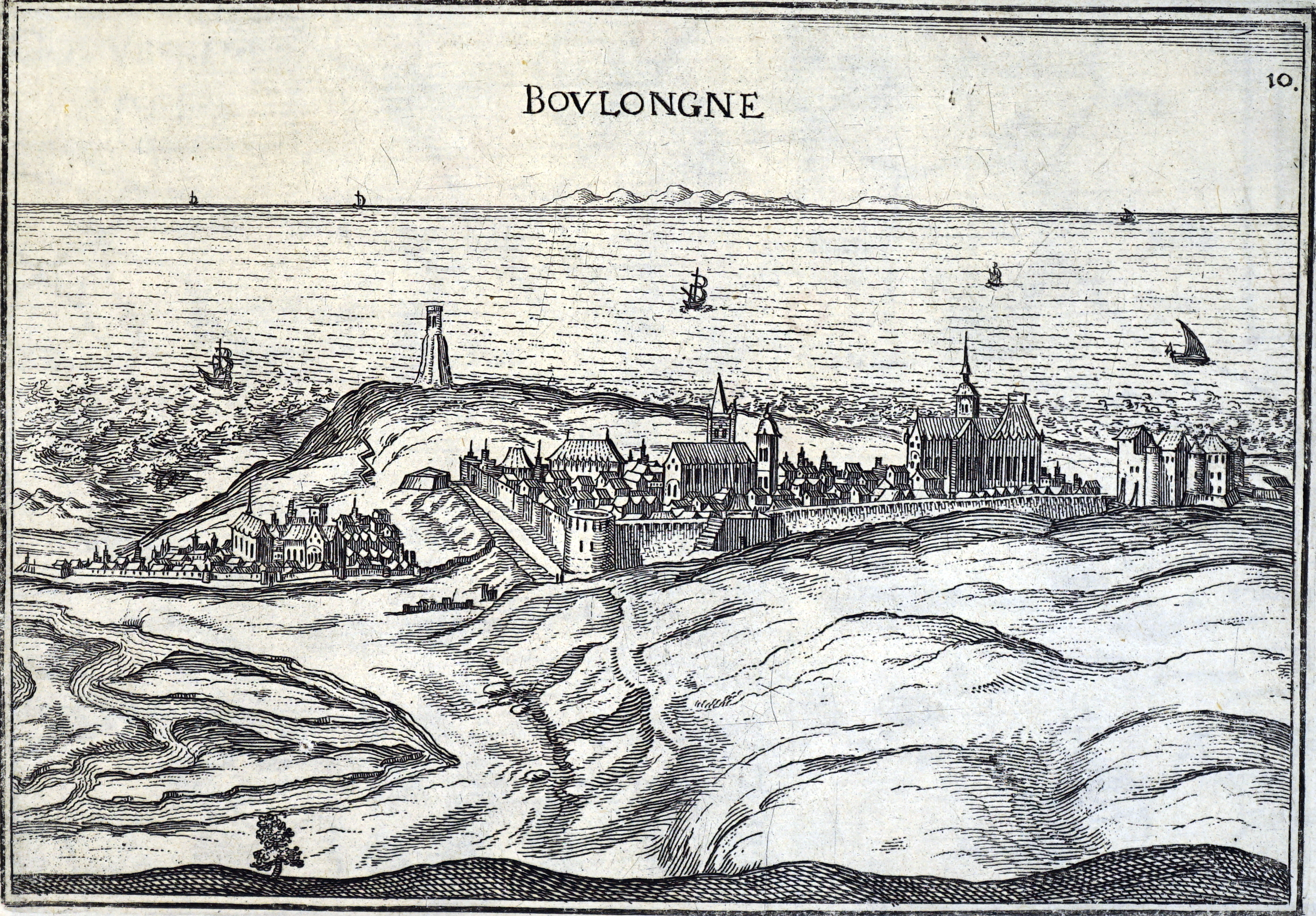 sur un dessin de Tassin.